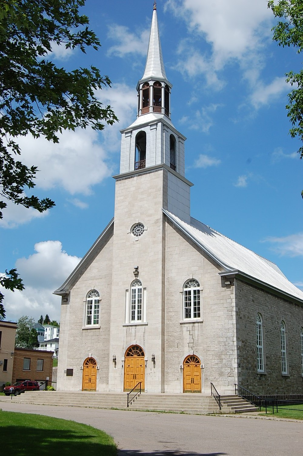 L'église Saint-Alphonse-de-Liguori de Bagotville est une église construite en 1862. Son noyau institutionnel a été constitué site du patrimoine en 1991.